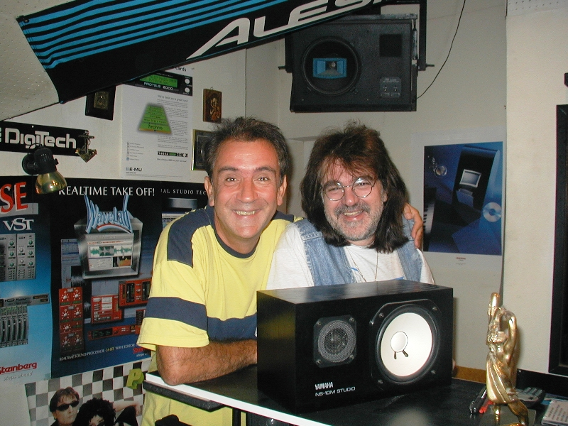 Чочо и Дени в "Студиото" със статуетката на "Златният Орфей" Описание и източник Чочо и Дени в "Студиото" със статуетката на "Златния Орфей"